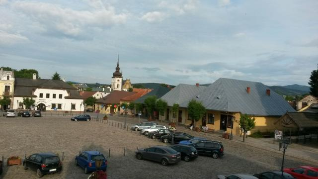 Rynek w Starym Sączu